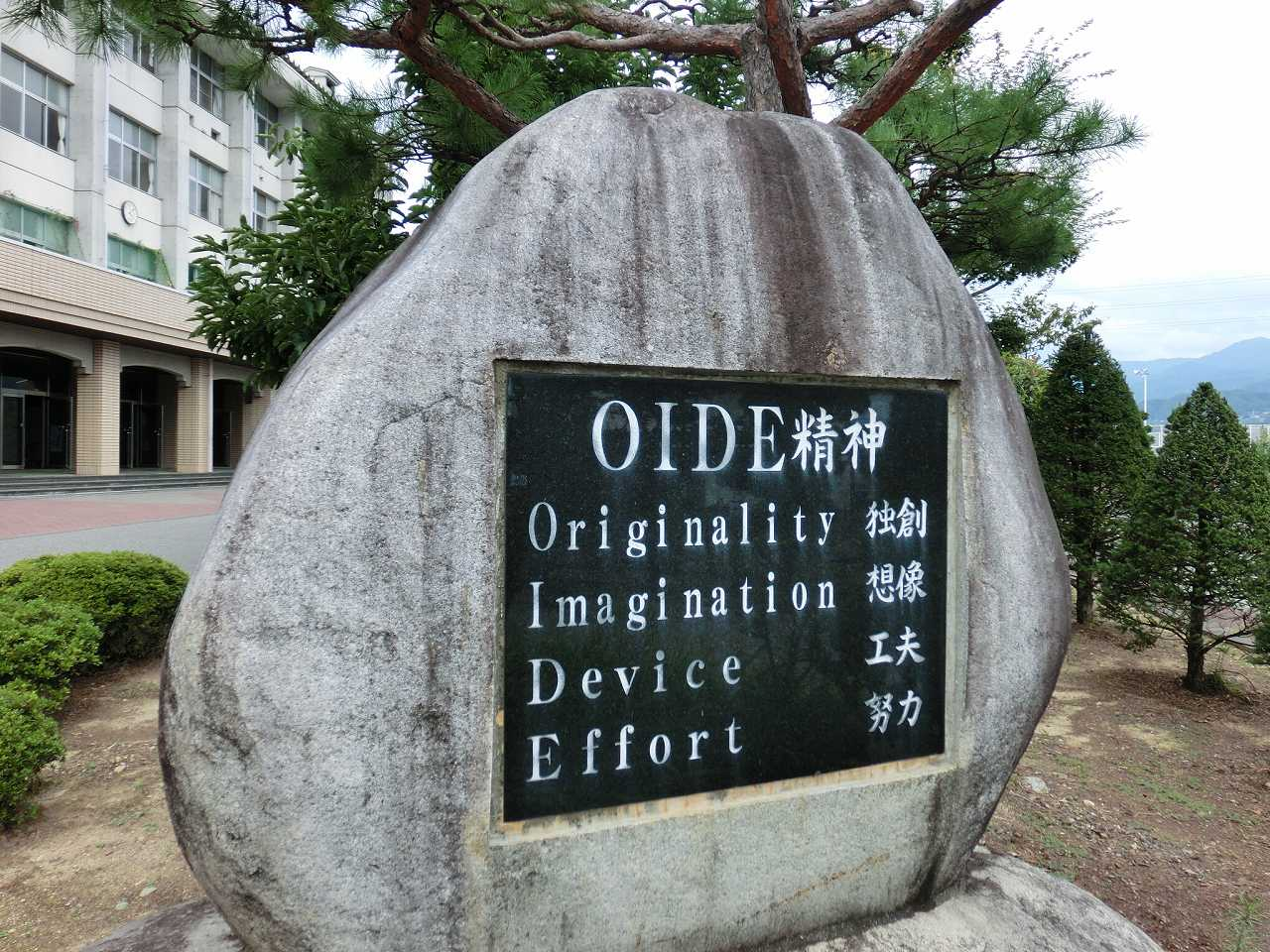 長野県飯田工業高等学校の校是「OIDE」 O=Originality（独創） I=Imagination（想像力） D=Device（工夫） E=Effort（努力）を意味する。